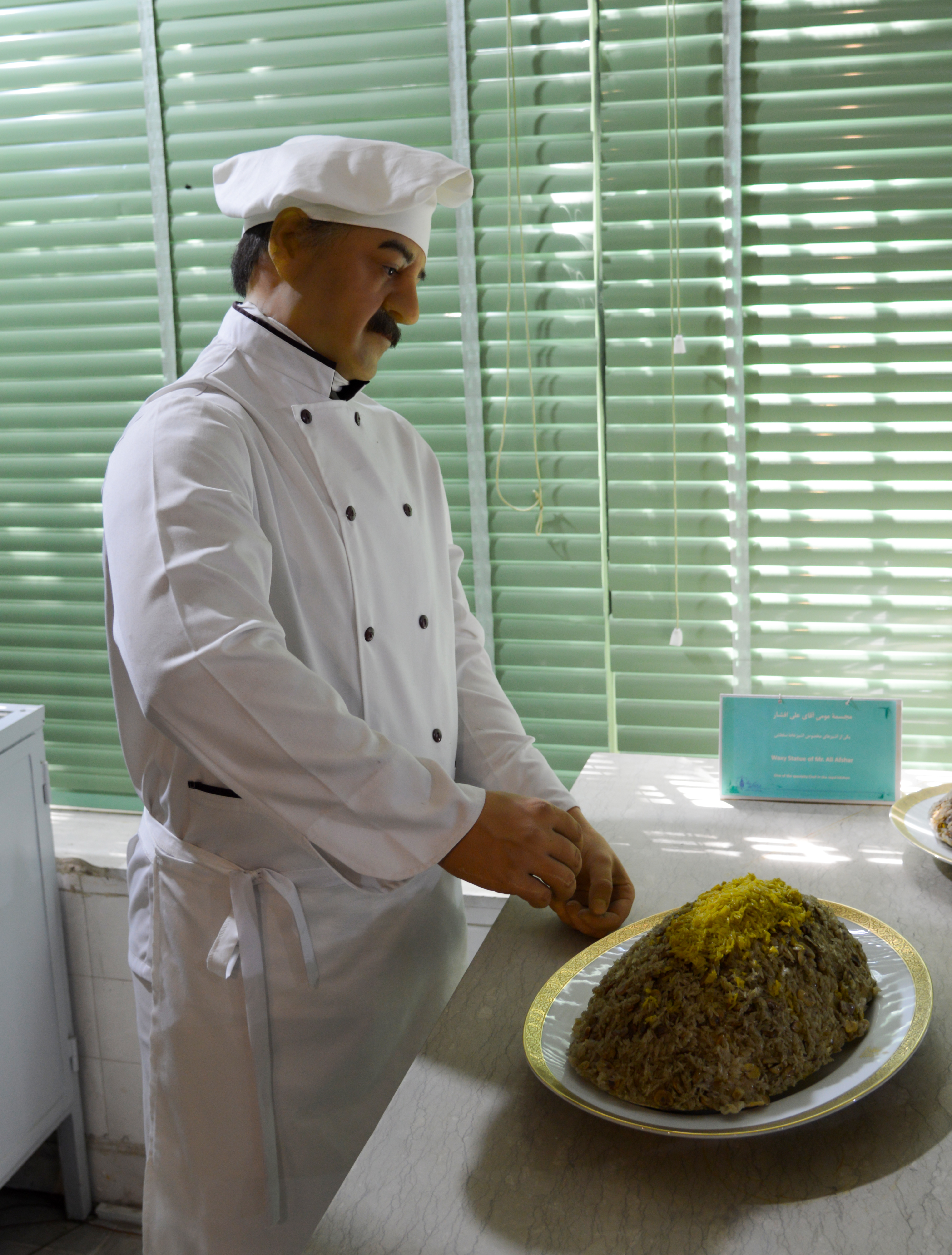 آشپزخانه سلطنتی کاخ سعد آباد